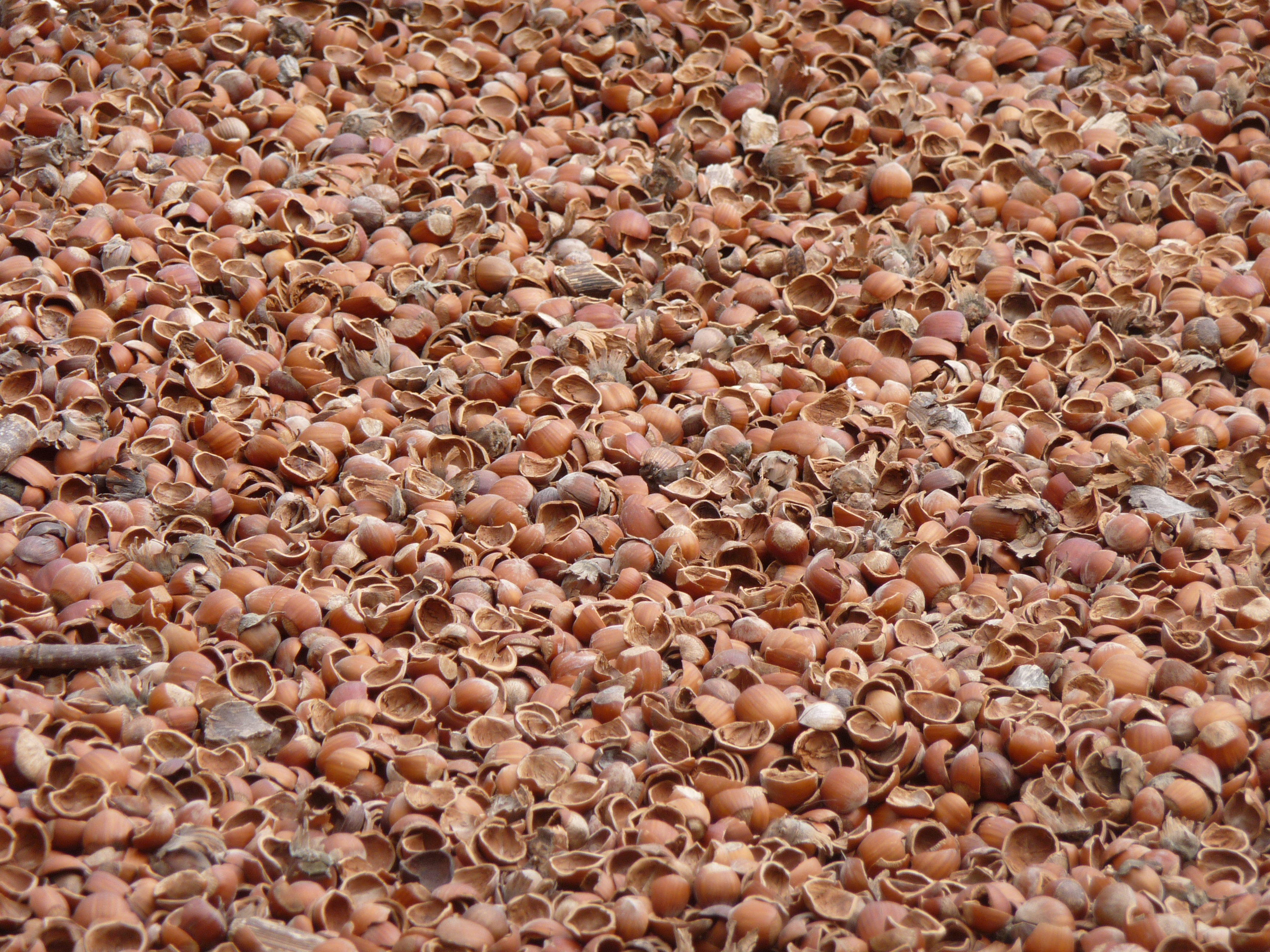 Coques de noisettes.